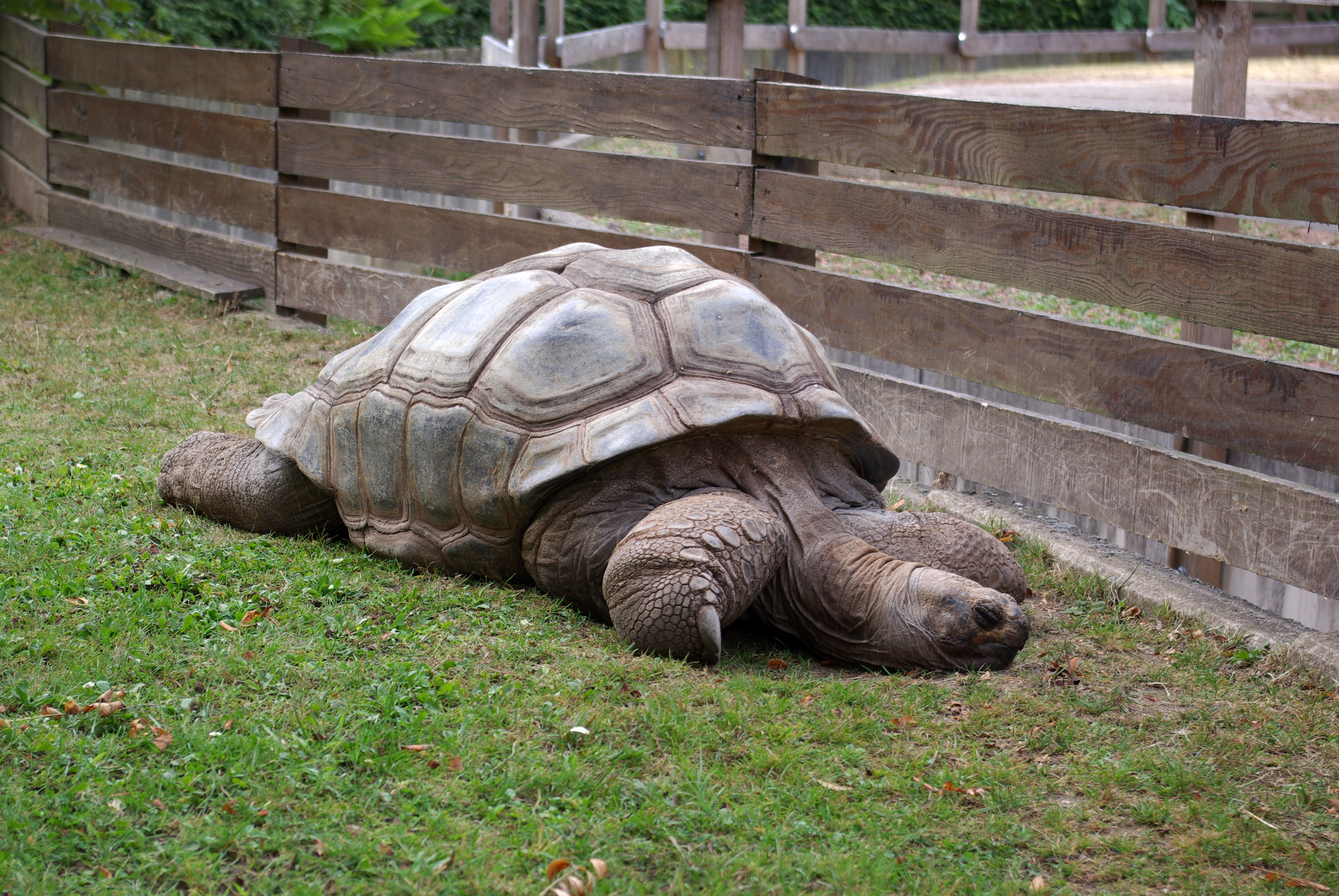 Aldabra-Riesenschildkröte Aldabrachelys gigantea Geochelone gigantea